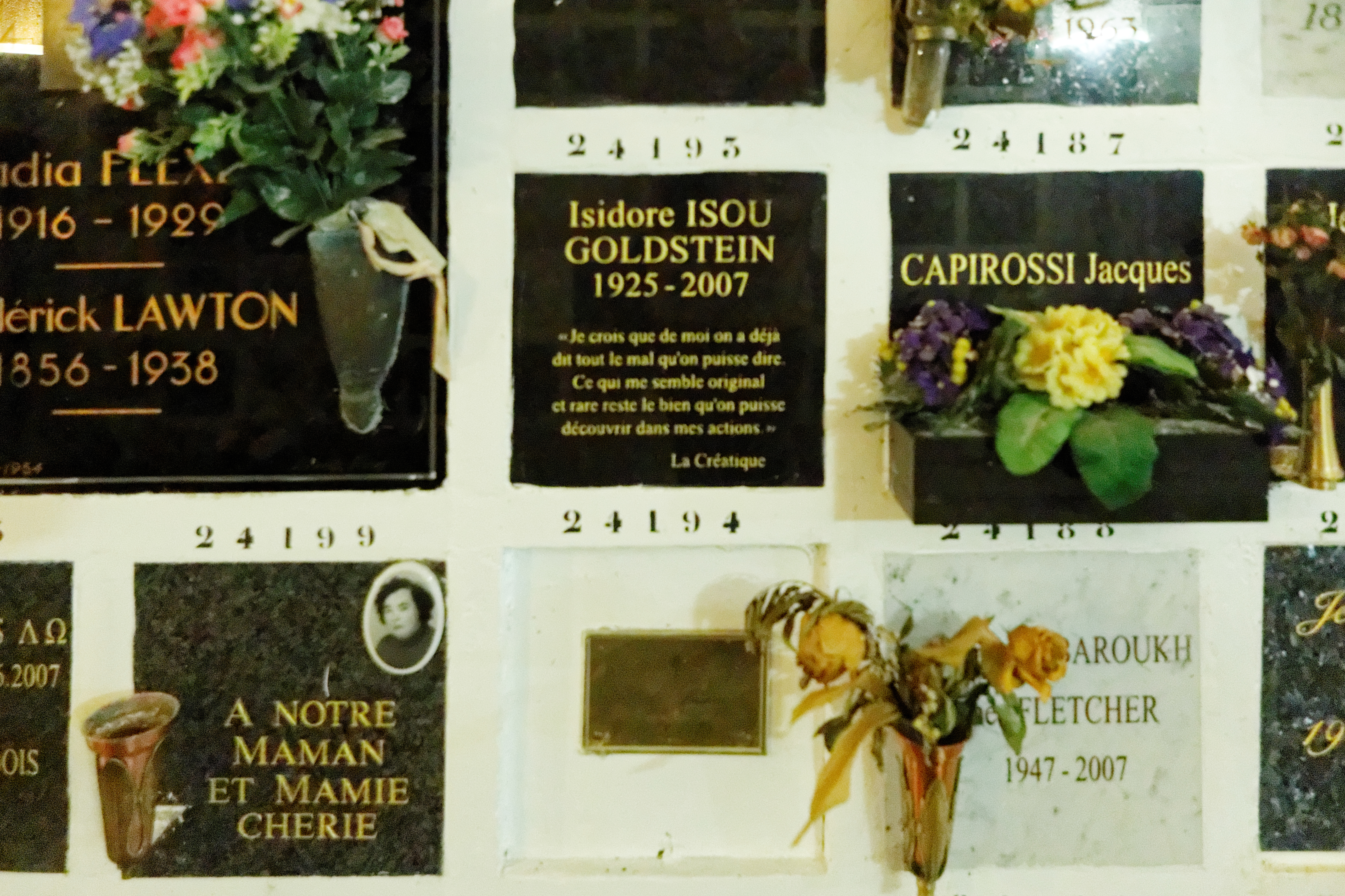 Cases du columbarium du cimetière du Père-Lachaise.